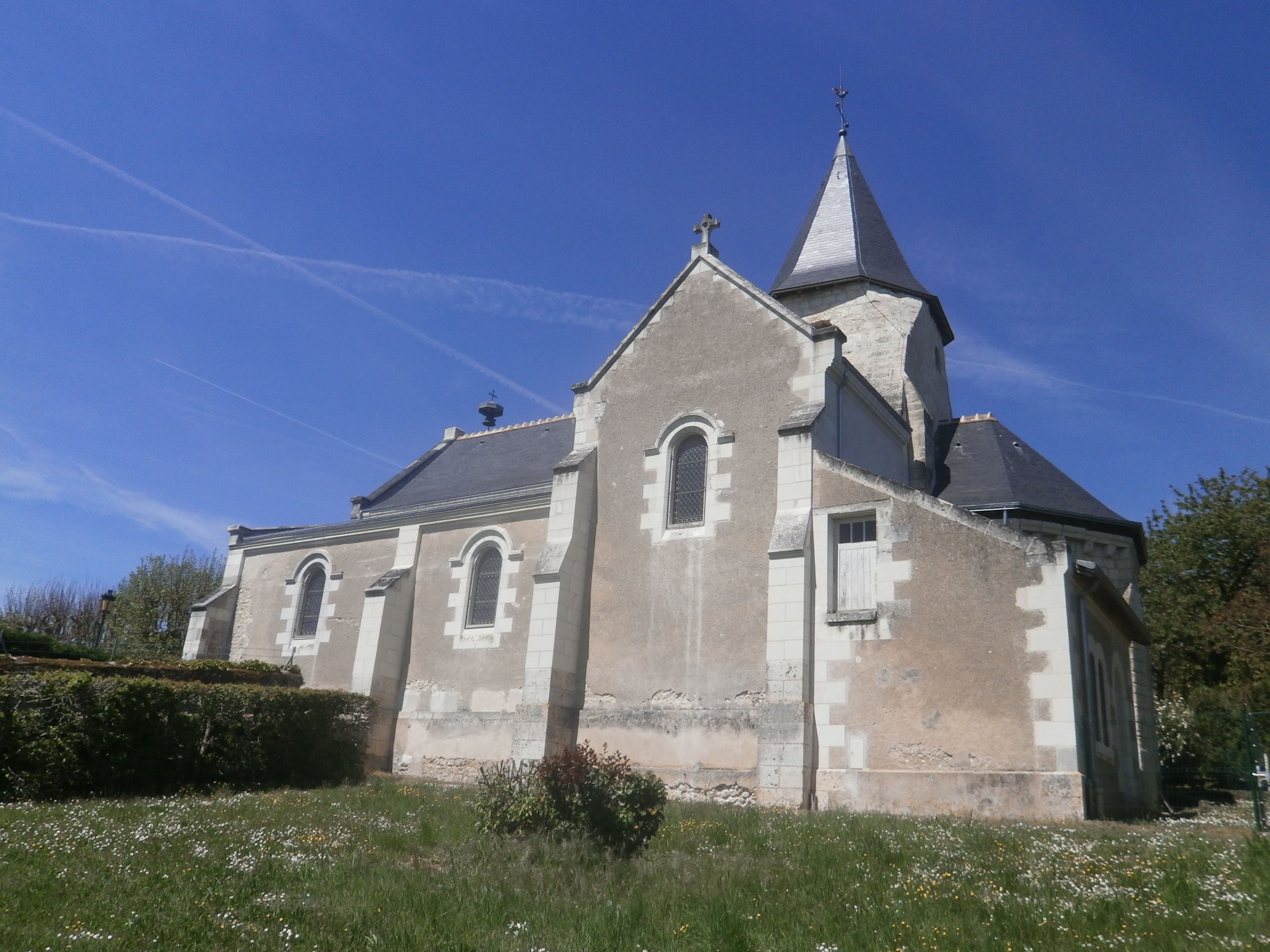 L'église de Chisseaux